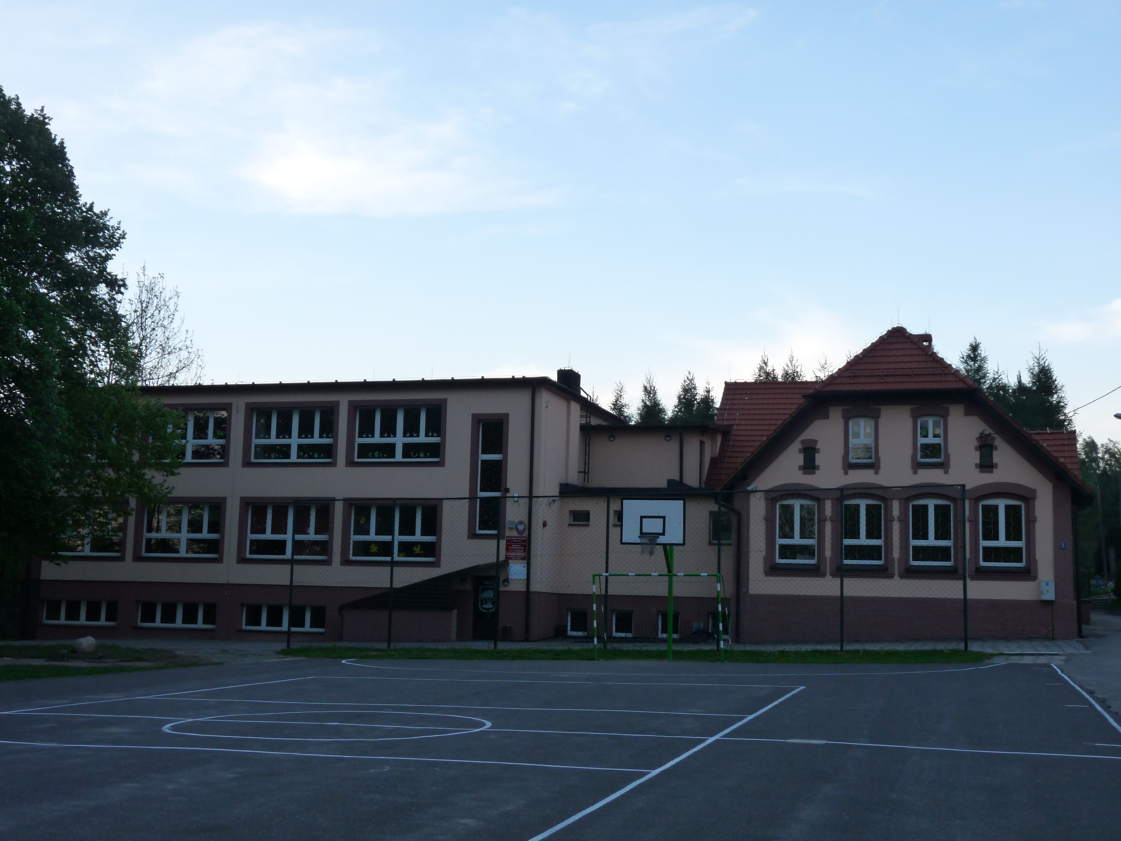 Usytuowana w centrum Skrbeńska przy ul. Szkolnej